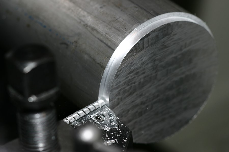 Schruppbearbeitung beim Drehen von Aluminium